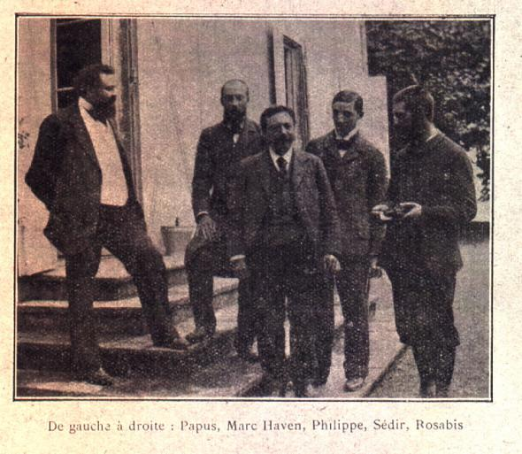 Мартинисты